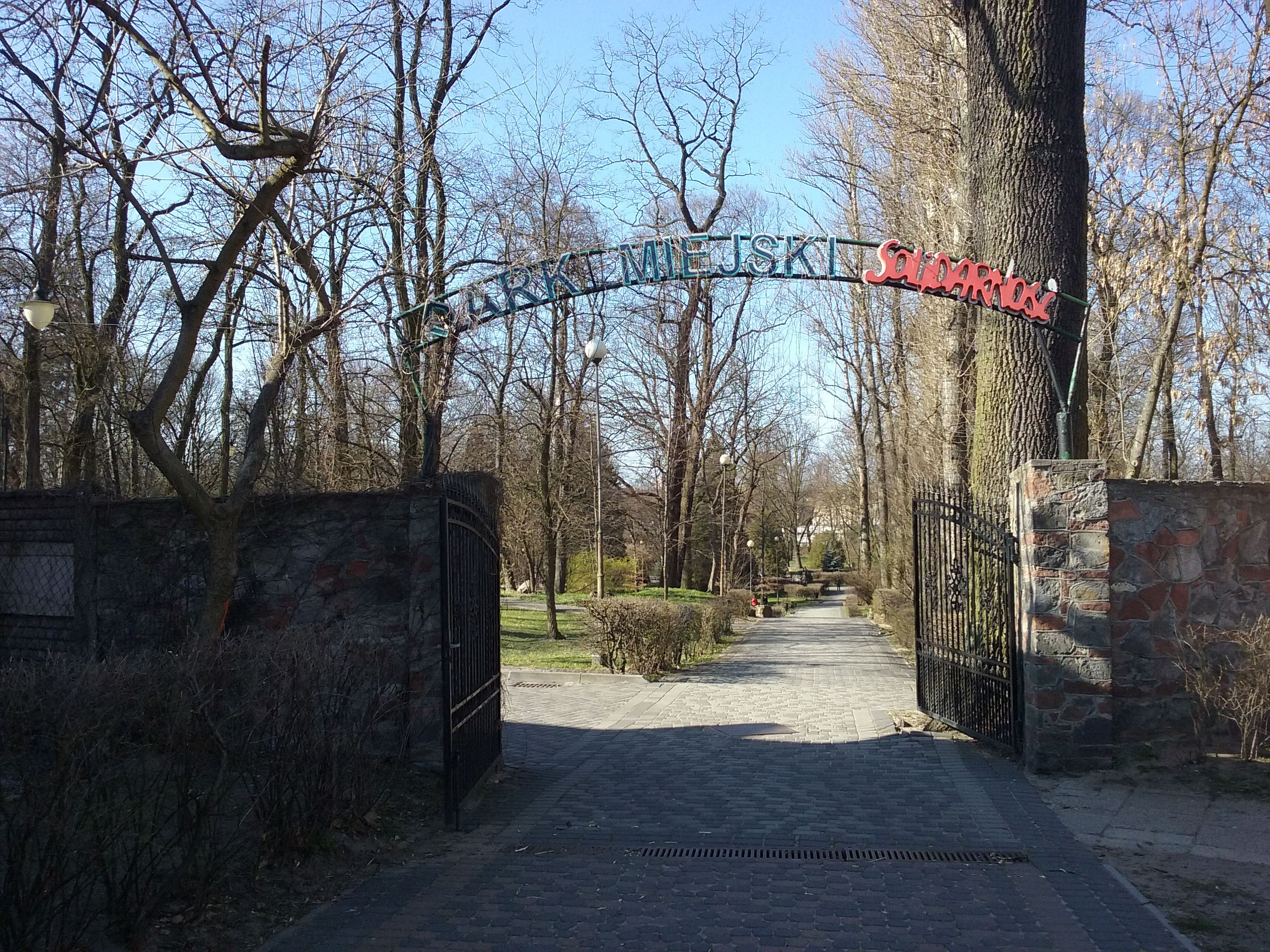 Tomaszów Mazowiecki w województwie łódzkim PL, EU. Park Miejski im. Solidarności, wejście od ulicy Browarnej i Mościckiego. CC0